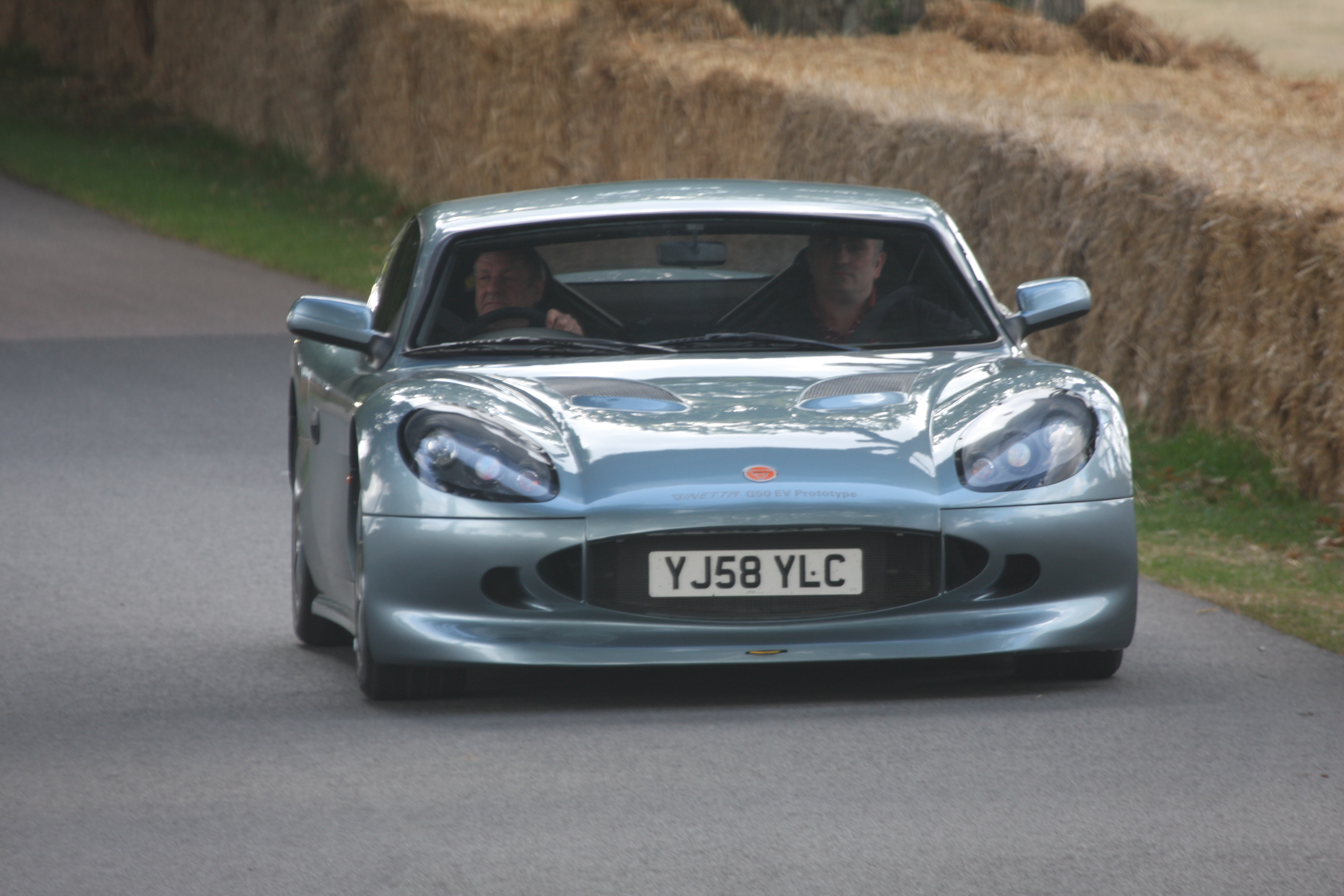 Goodwood 2009